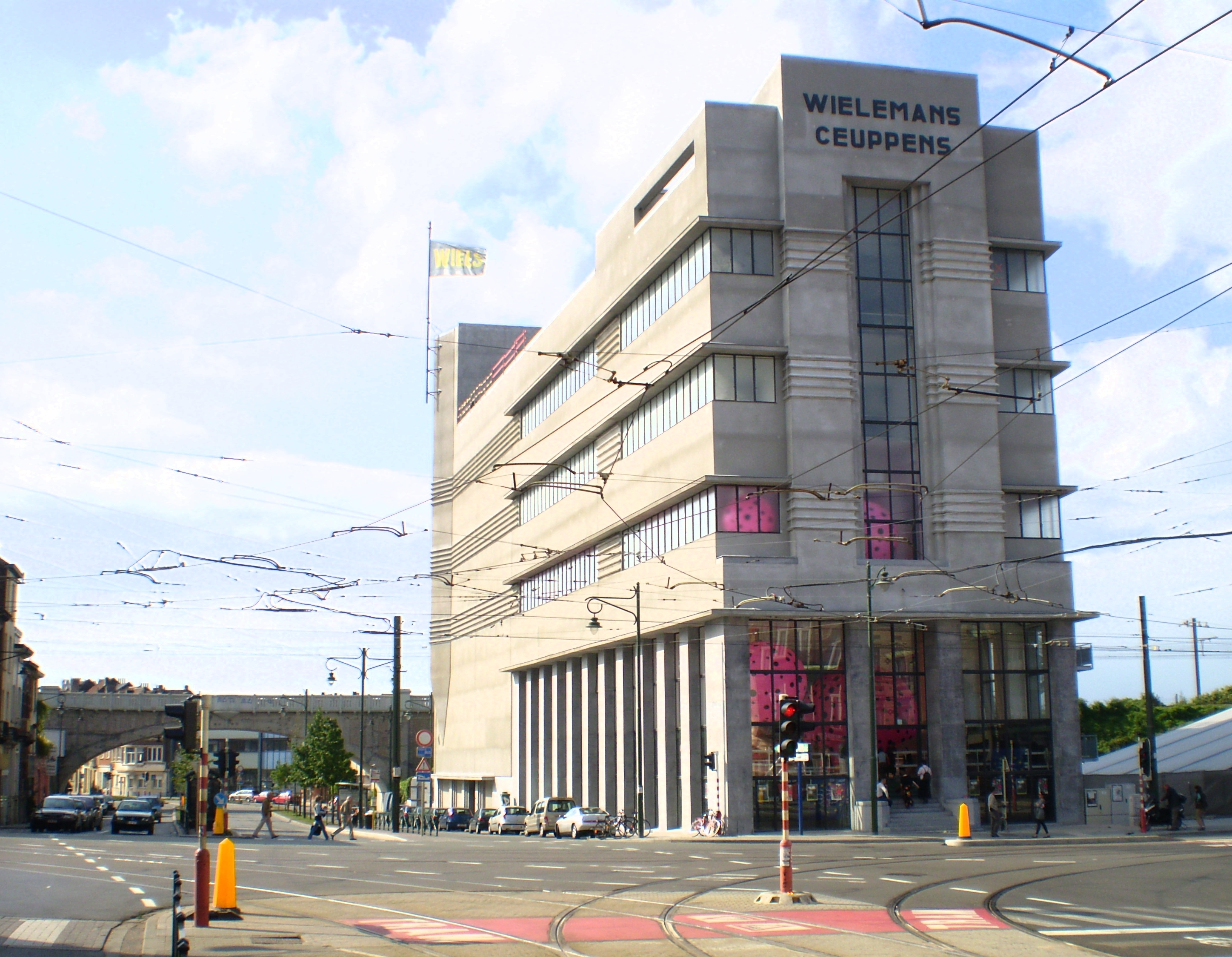 Le Wiels, centre d'art contemporain à Bruxelles - Ancienne brasserie Wielemans-Ceuppens construite par l'architecte Adrien Blomme